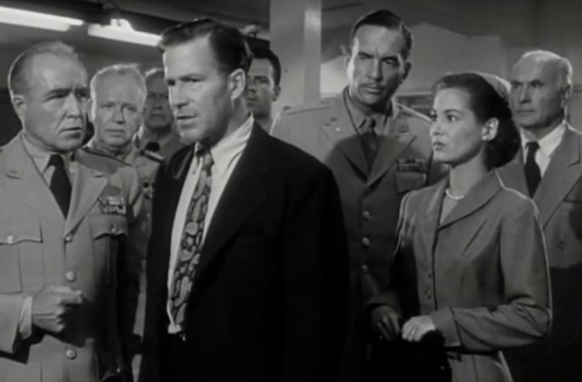 L. to R. (foreground) : Grandon Rhodes, Hugh Marlowe & Joan Taylor in Earth vs. the Flying Saucers - trailer (cropped screenshot)